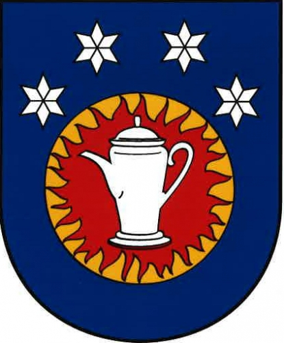 znak, Stružná, okres Karlovy Vary